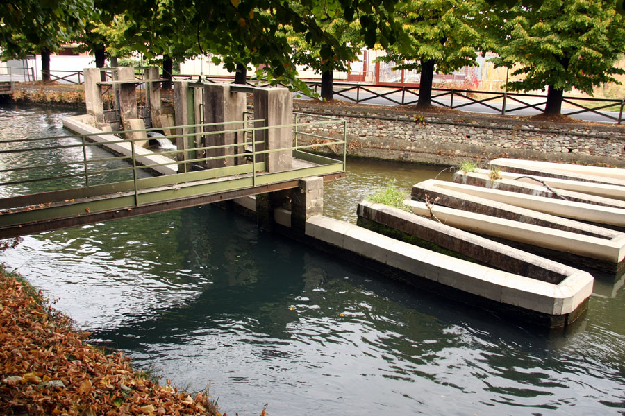 Complesso sistema di chiuse sulla Roggia Mora a Ghemme (NO), nei pressi dello stabilimento Ponti